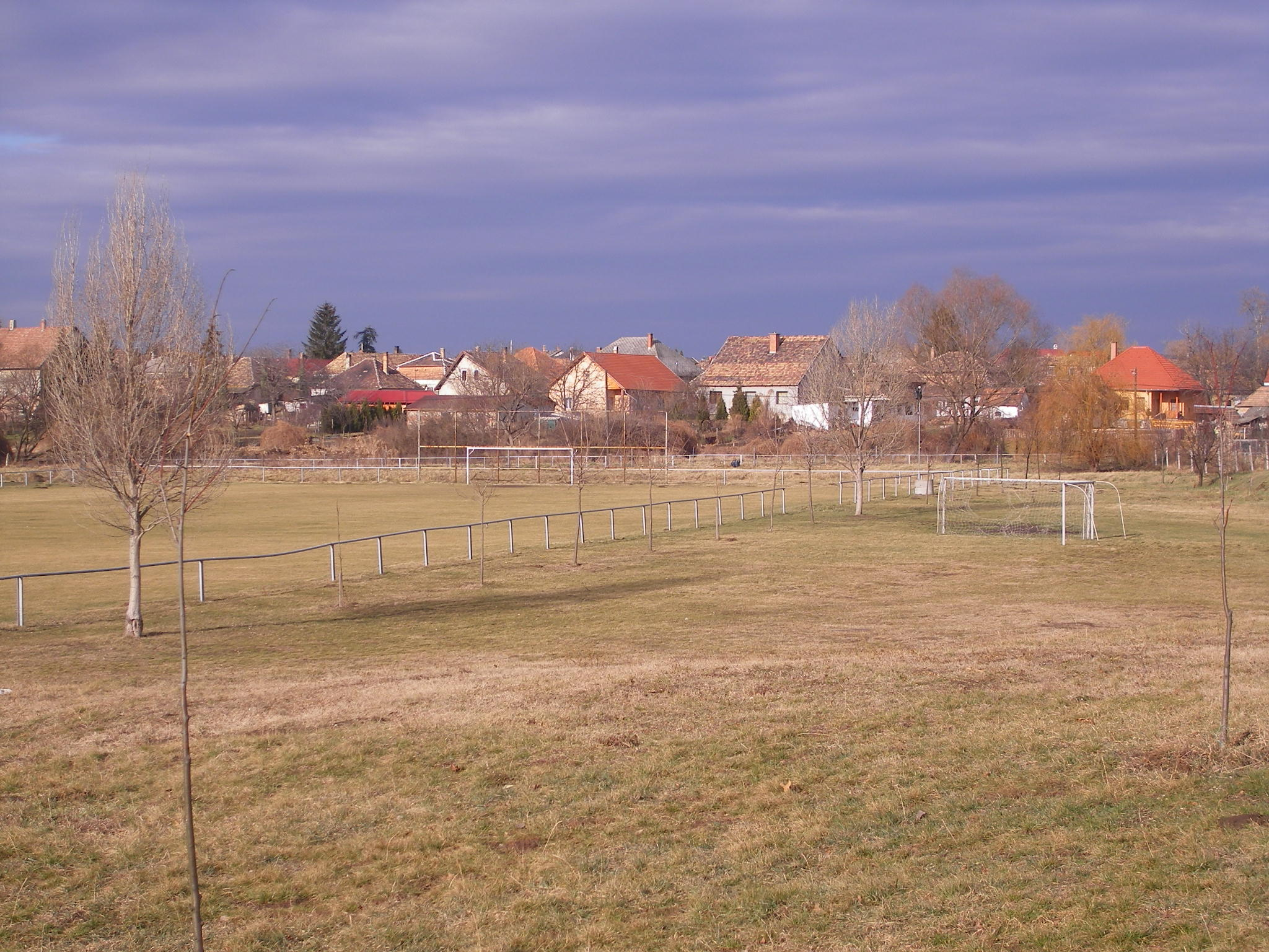 Baj